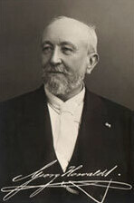 Kommerzienrat Georg Ferdinand Howaldt (* 24. März 1841 in Kiel; † 10. Mai 1909 in Wildbad) war ein deutscher Gründerzeitunternehmer und Schiffbauer.